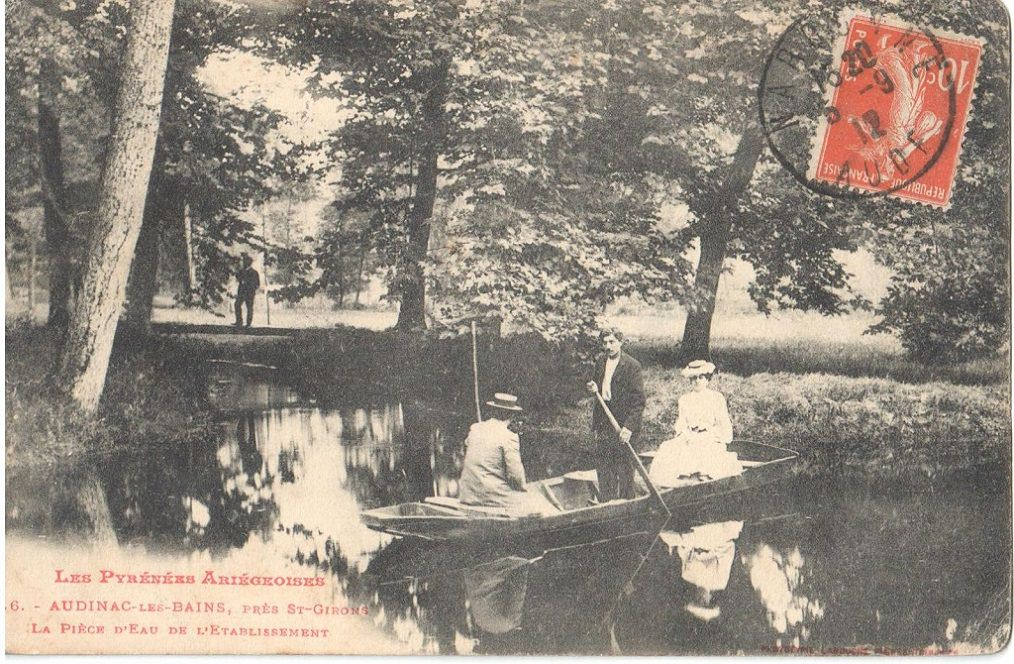 Carte postale d'Audinac-les-Bains: la grande allée